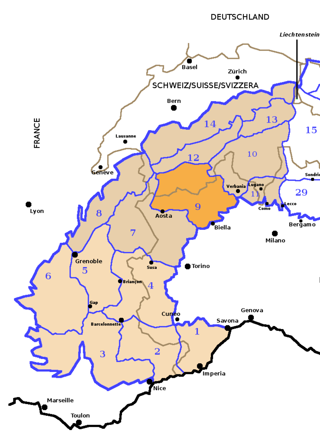 Alpi Occidentali secondo la SOIUSA con evidenziate le Alpi Pennine